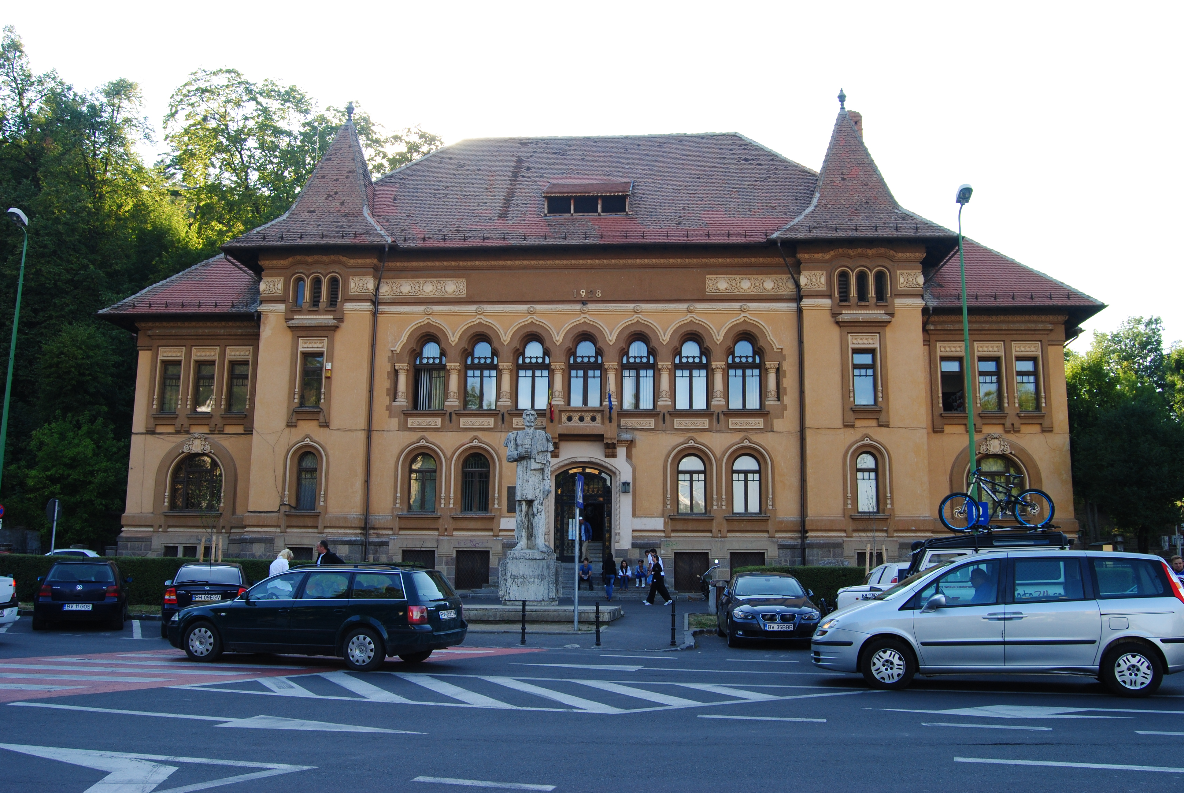 Fosta Cameră de Comerț, azi Biblioteca Județeană "George Barițiu"